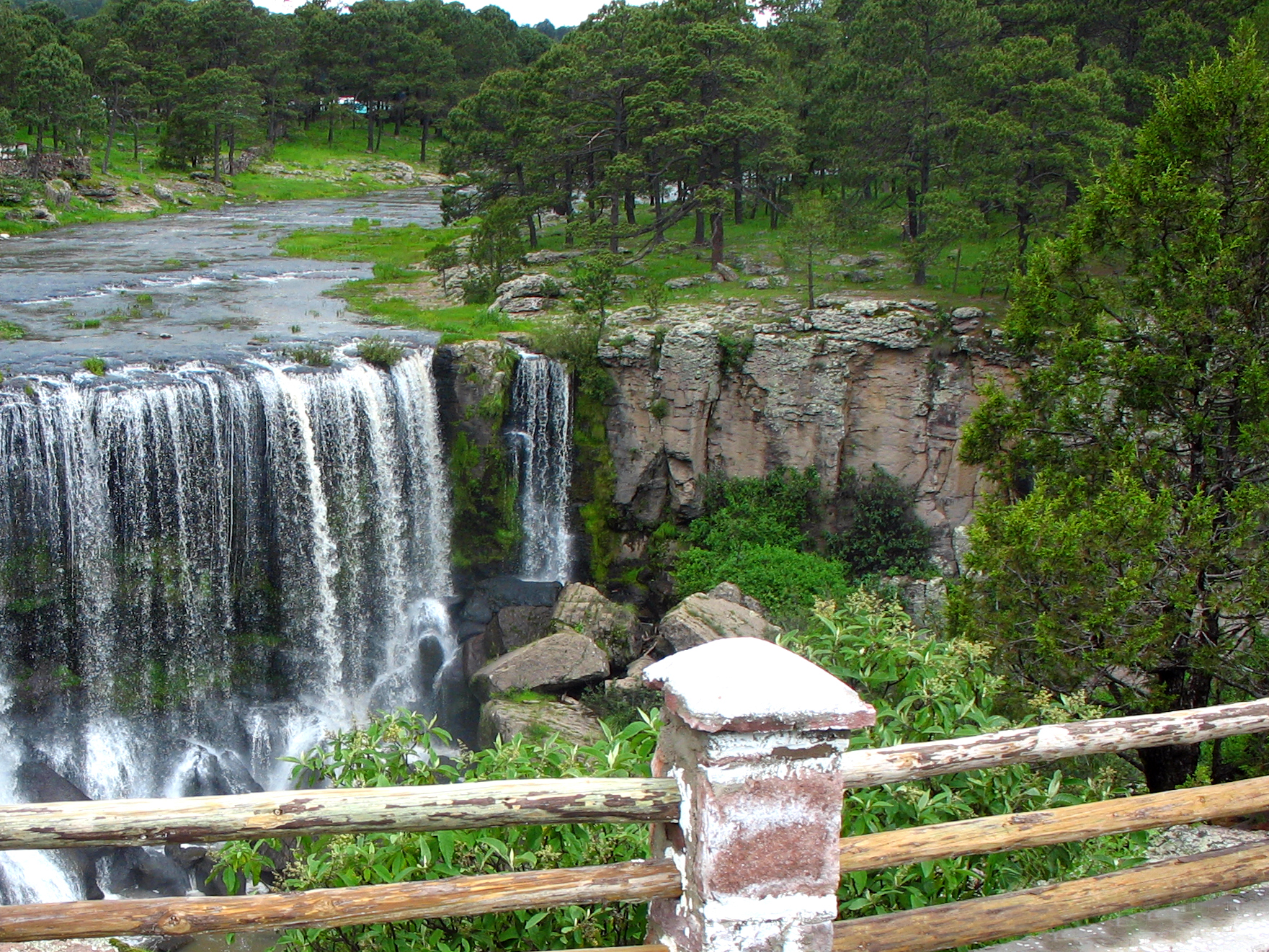 Cascada de Mil Diez, Durango. México.